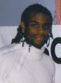 Photo du joueur de football Frédéric Piquionne lors de la saison 2004-2005. Cette photo à été prise par Mickaël Roure alias Altrensa pour Wikipédia. Elle ne saurait être utilisée sans la mention de son auteur. D'avance merci.